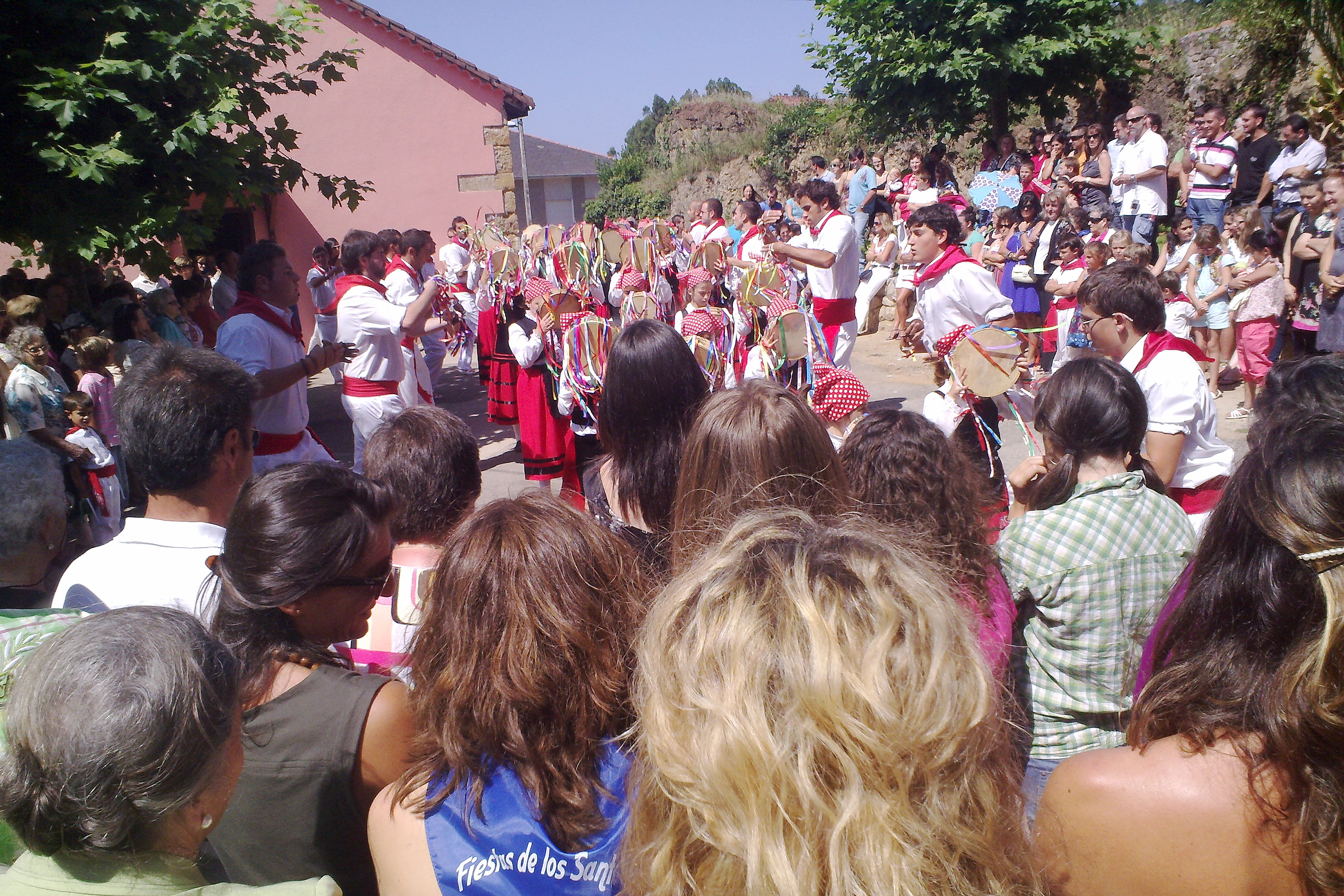 La jornada empezó a primera hora de la mañana con la Diana Floreada, para a mediodía pasar a la celebración de la misa cantada por el "Coro de Voces de Alfoz", amenizada además con la actuación itinerante de los Picayos de Novales. A continuación tuvo lugar el pasacalles con los piteros Nando y Chus, así como la actuación itinerante de la ronda La Flor del Limón. La jornada, que estuvo salpicada de muchas actividades para niños y mayores finalizó con la tradicional romería verbena.